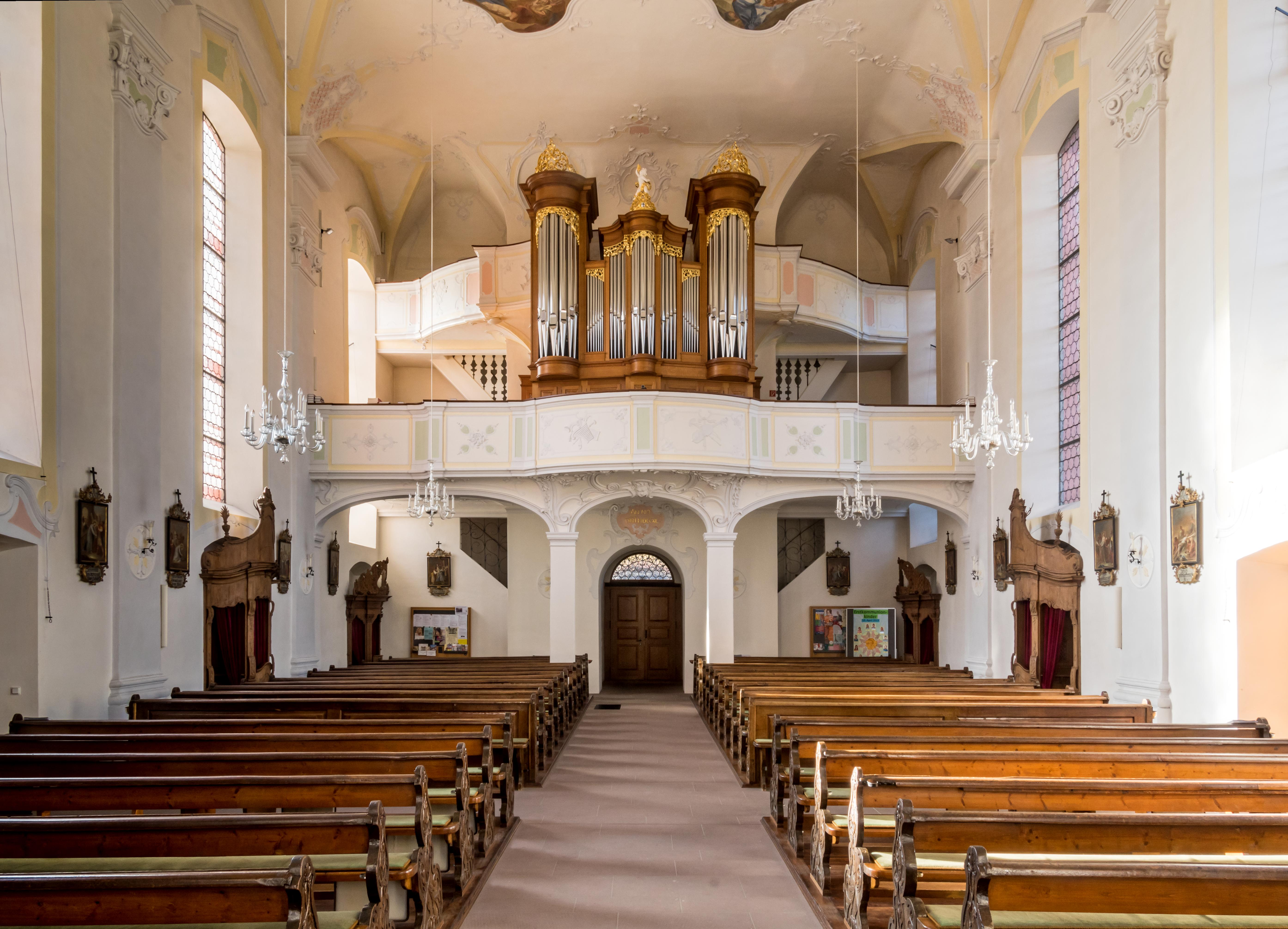 Bilder aus der katholischen Kirche St. Remigius in Merdingen St. Remigius